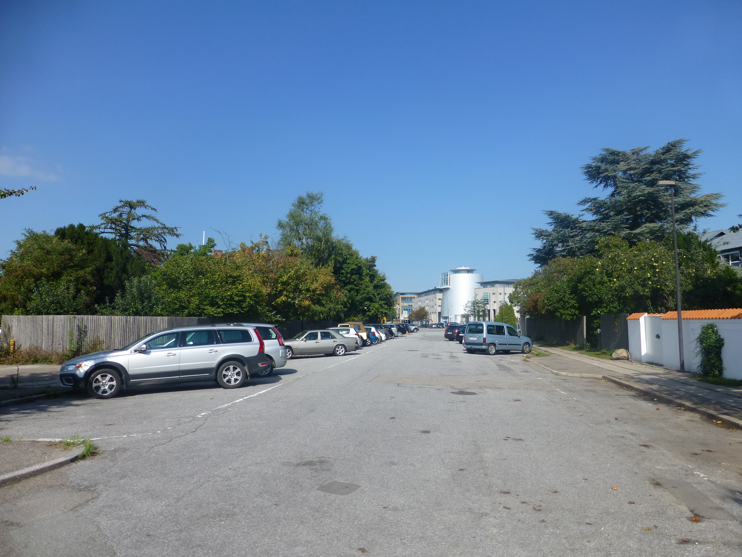 The street Tingskiftevej in Hellerup in Copenhagen.